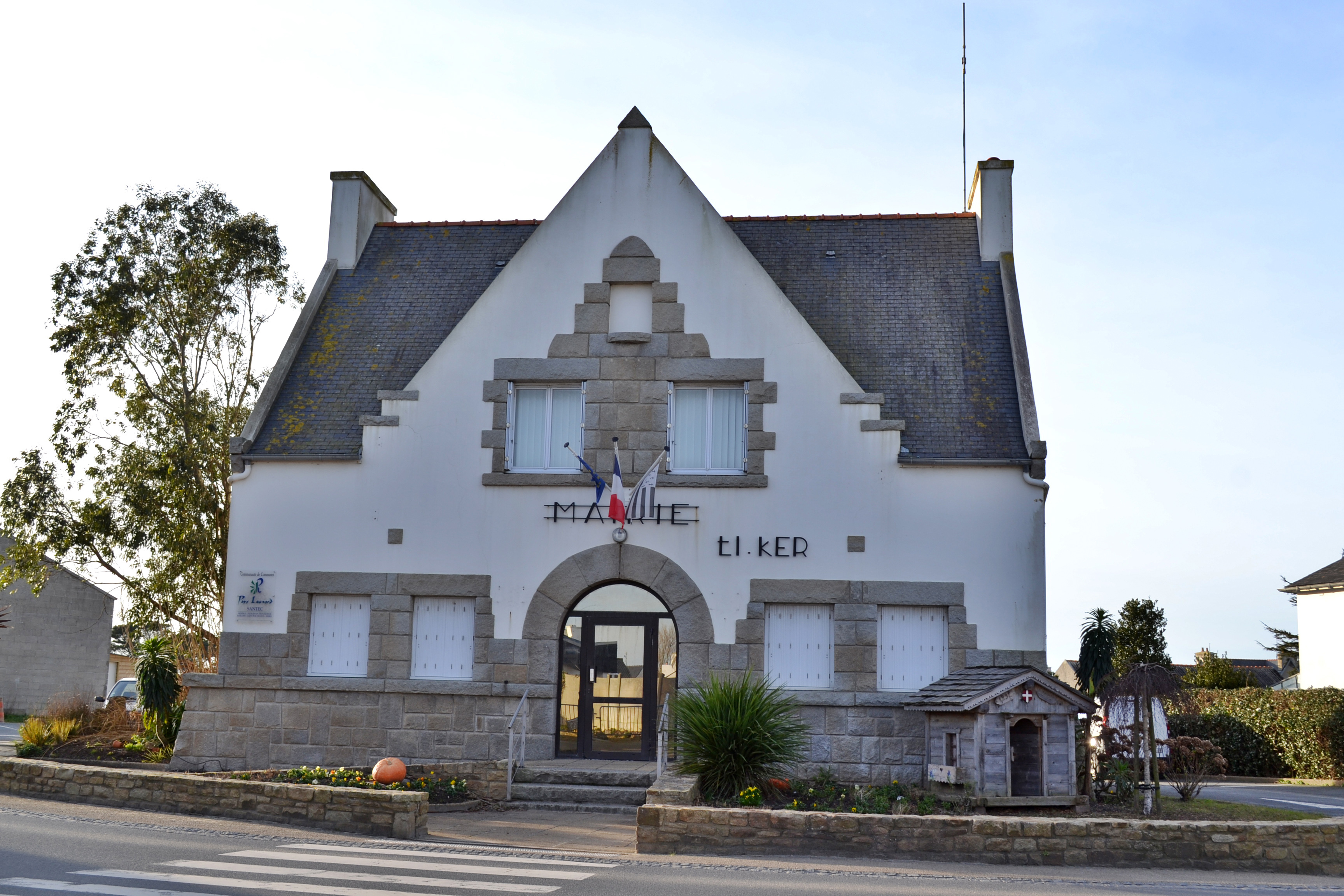 Mairie de Santec dans le Nord Finistère en Bretagne.